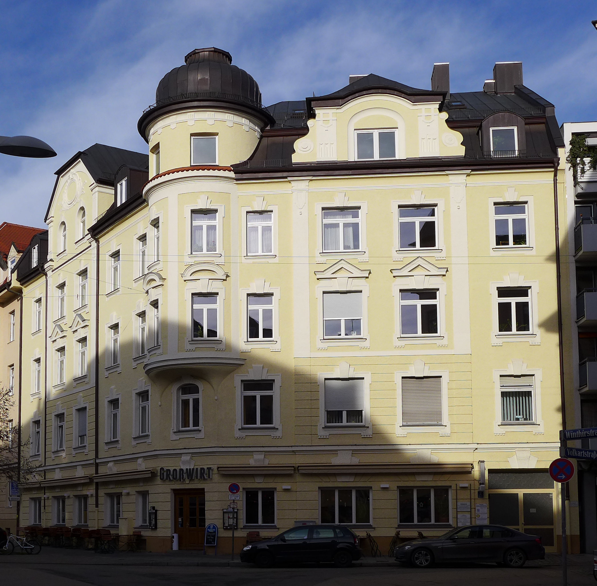 Volkartstr. 2, München